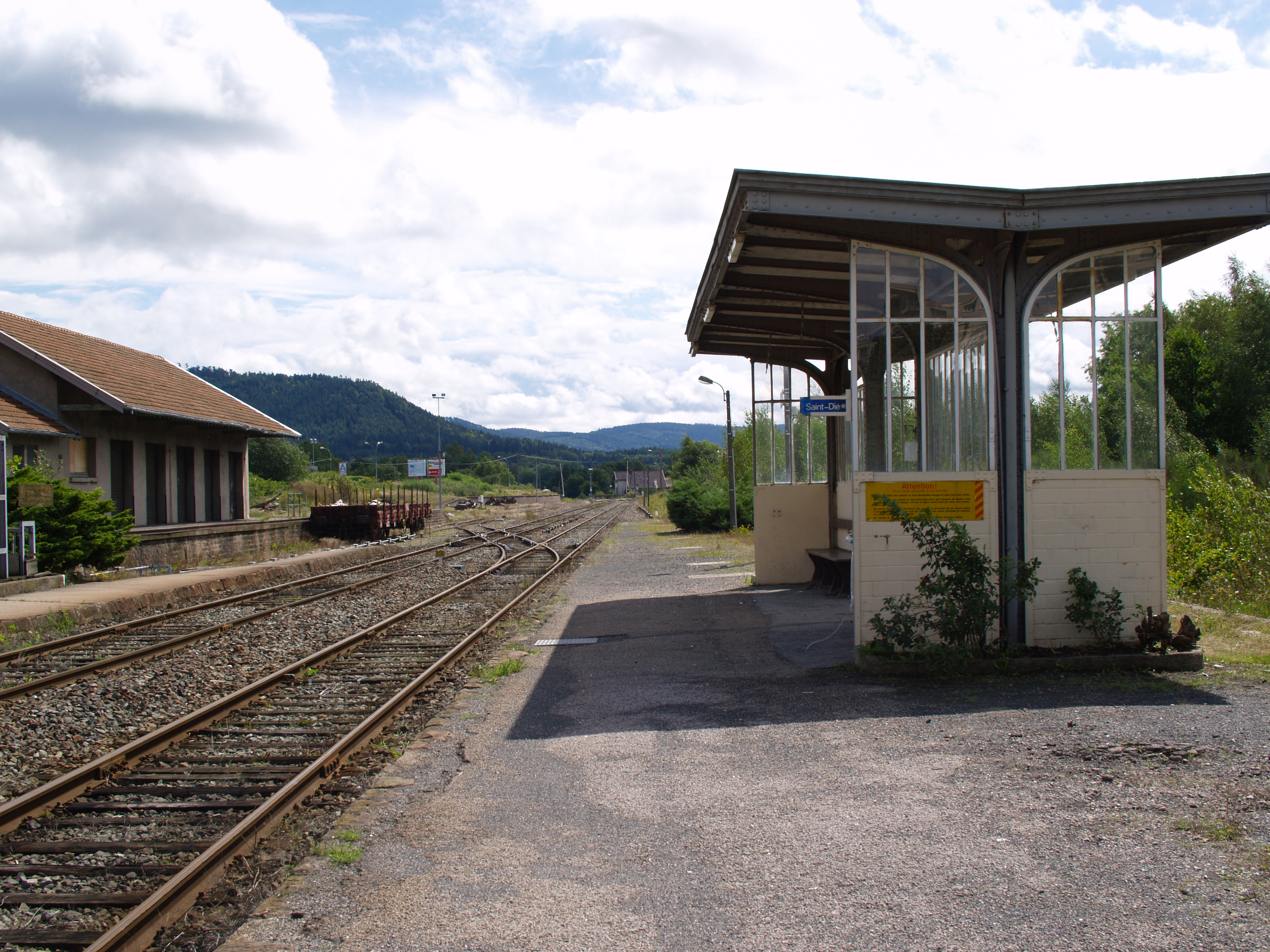 La gare de Bruyères (Vosges, France)